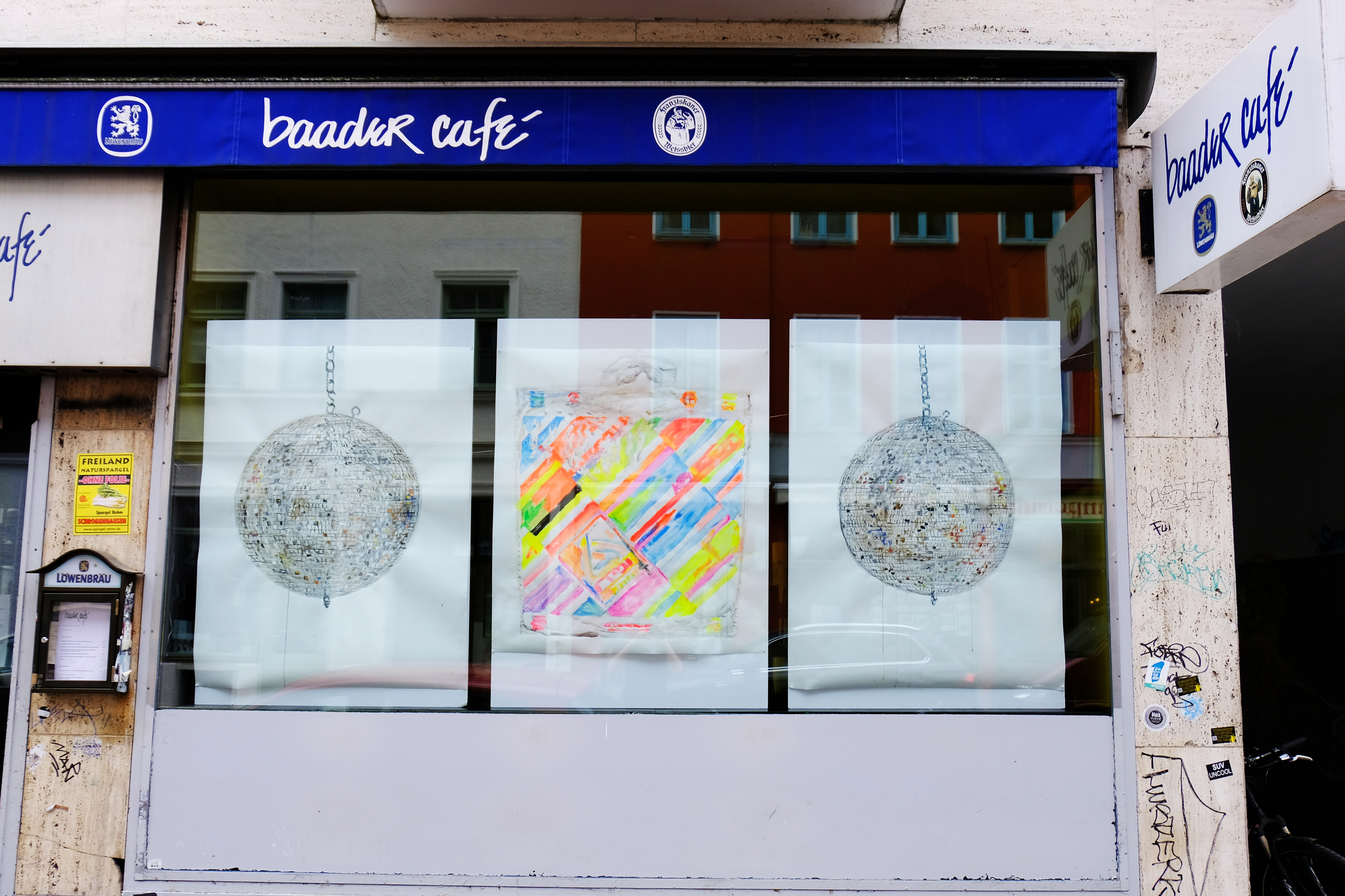 Drei Werke von Hansjörg Mayer, die in einem Schaufenster des Münchner „Baader Café“ präsentiert werden. Sie wurden zugunsten des unter den Folgen der Corona-Krise leidenden Lokals versteigert (2020).